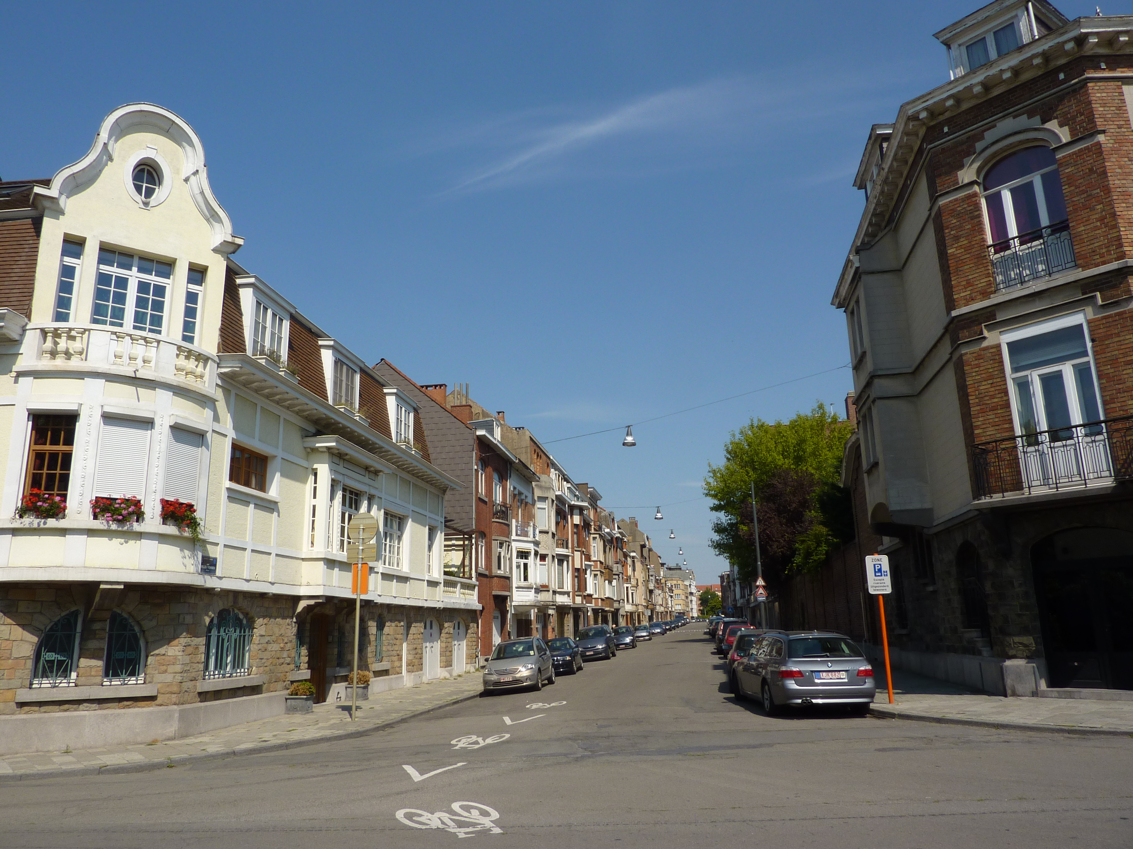 La rue Willem Kuhnen à Schaerbeek, Bruxelles, Belgique.